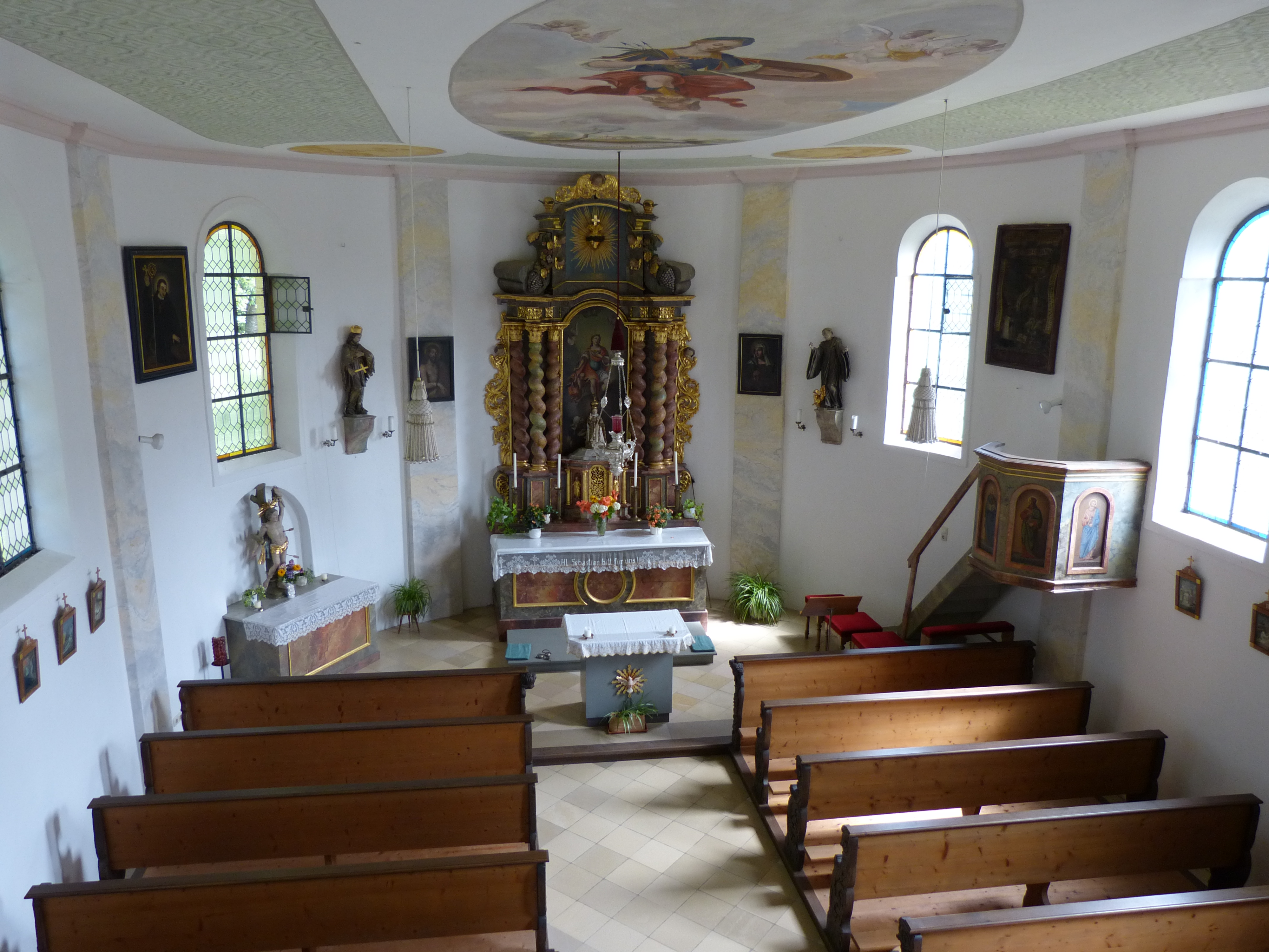 Kapelle St. Sebastian, Sankt Sebastian, Landkreis Unterallgäu, Bayern